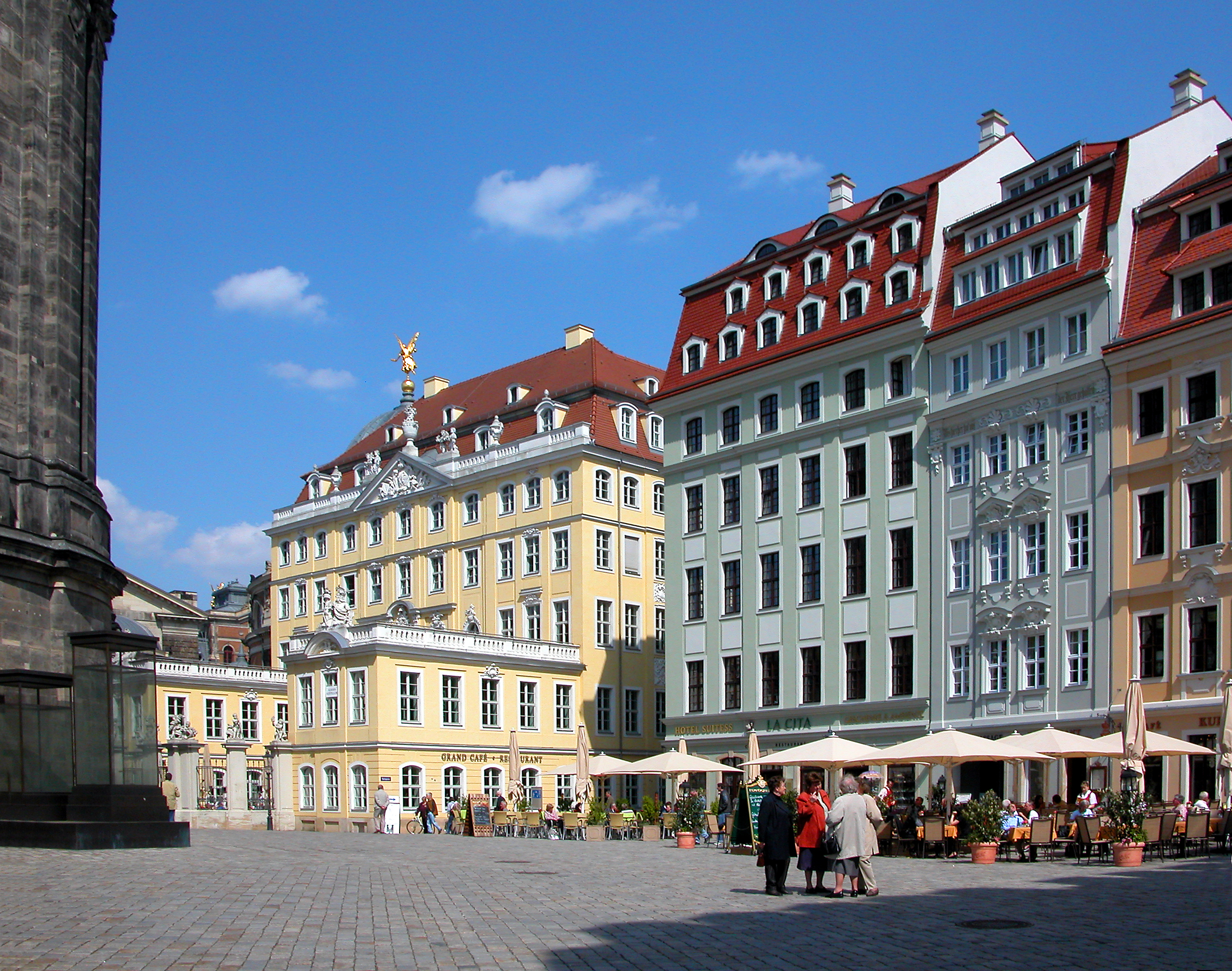 24.04.2008 01067 Dresden Neumarkt: Blick nach NO. Coselpalais. Rechts davon Haus "Zum Schwan", An der Frauenkirche 13, Haus "Zur Glocke" An der Frauenkirche 14. [DSCN32311.TIF]20080424035DR.JPG(c)Blobelt